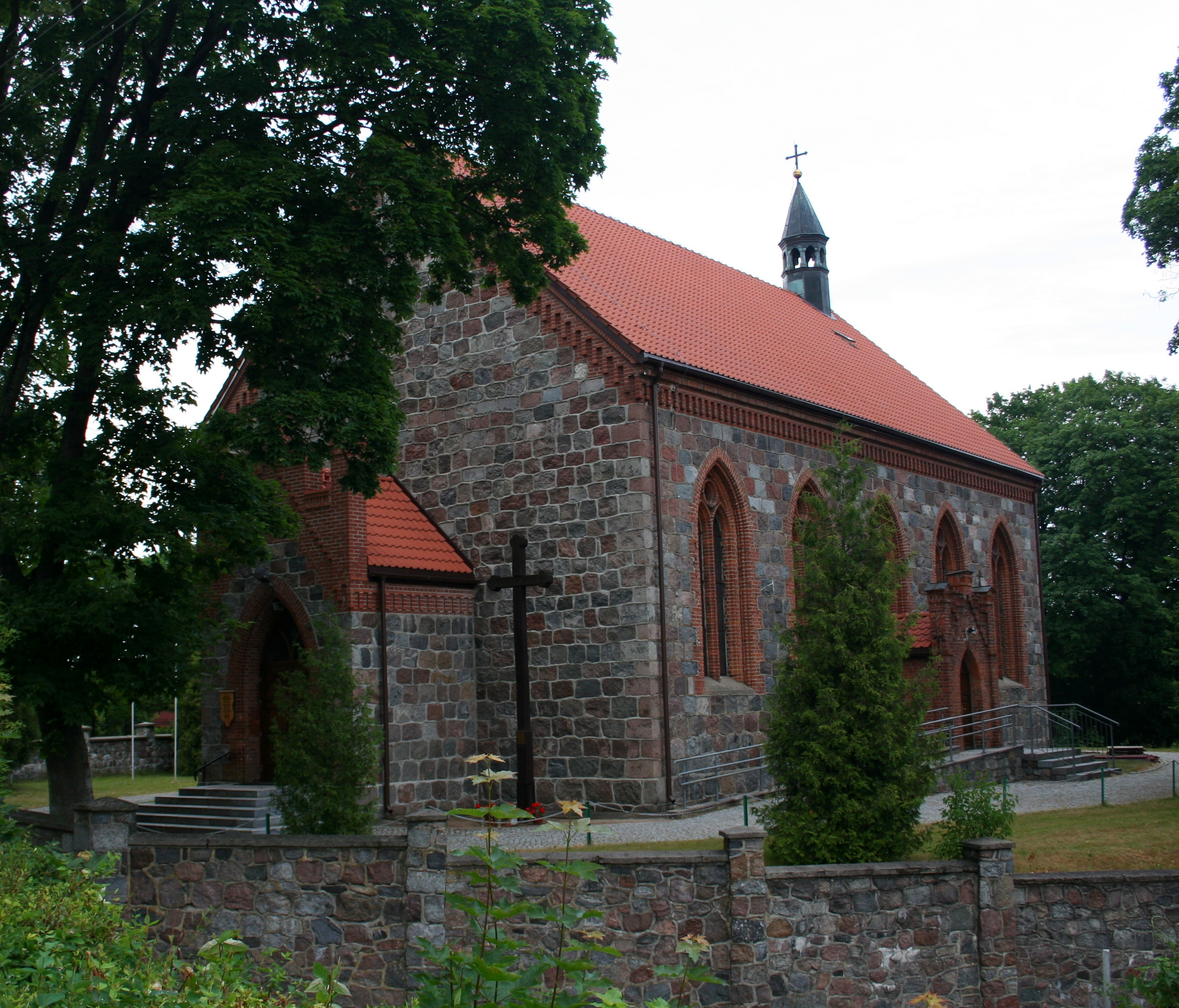 Kościół św. Trójcy w Sulęczynie, woj. pomorskie